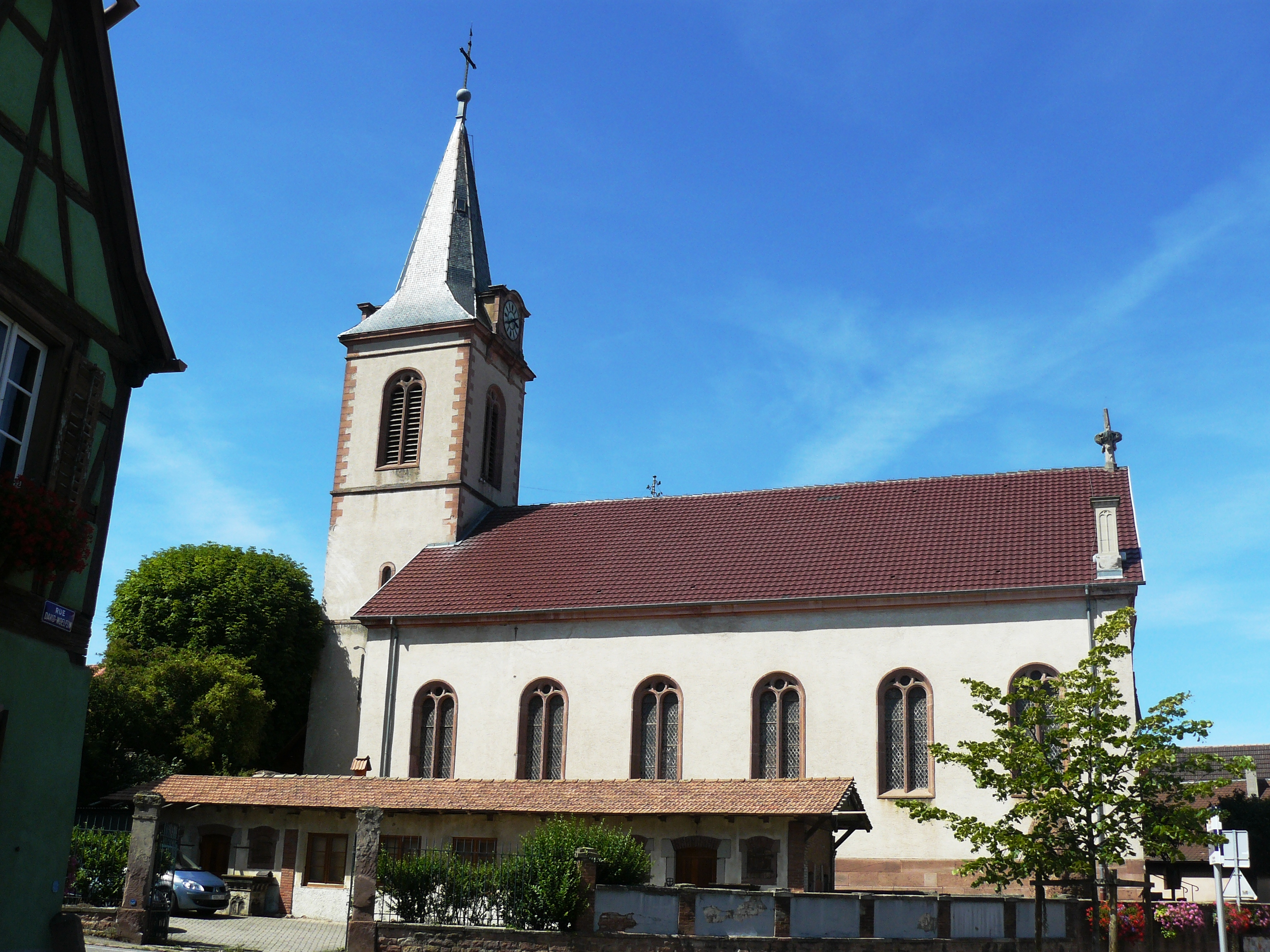 Église Saint-Sébastien (1866)